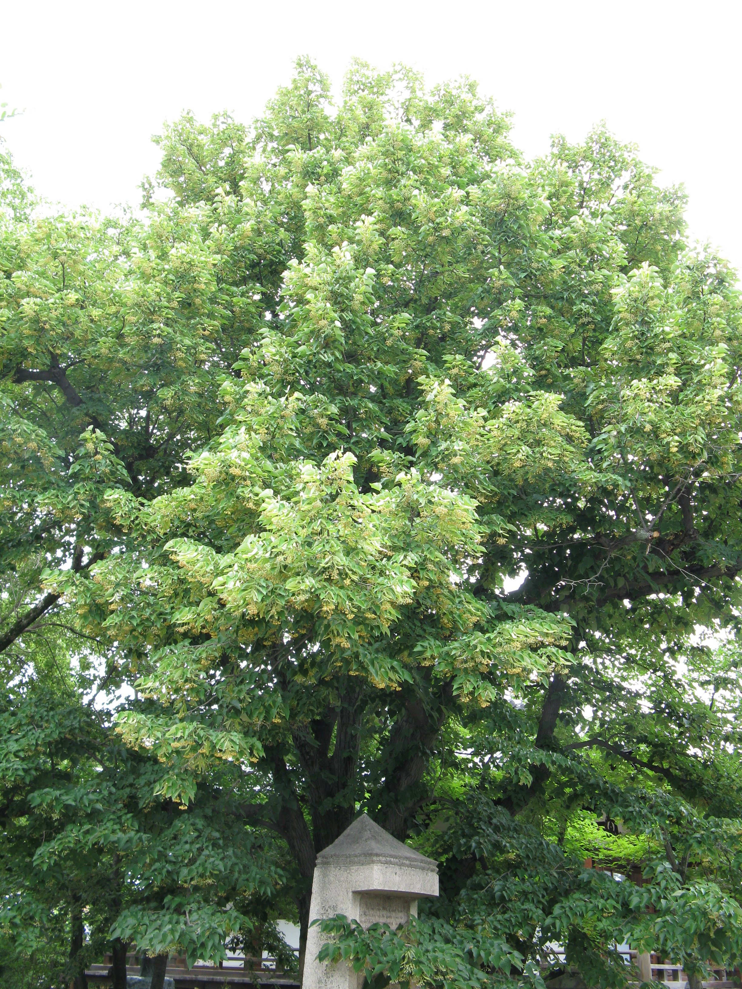 Scientific name Tilia miqueliana